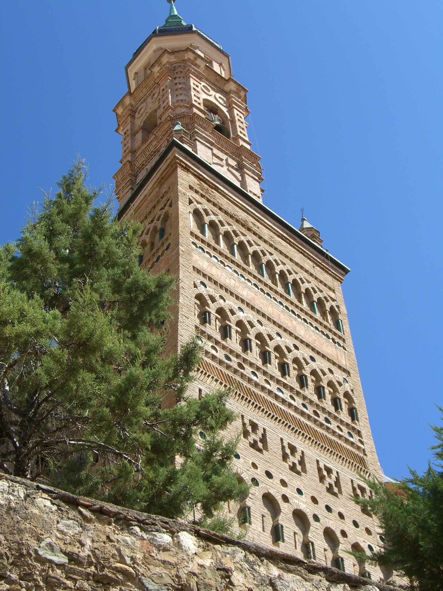 Torre de Ateca (Comunidad de Calatayud, Aragón) con un motivo en espina de pez.